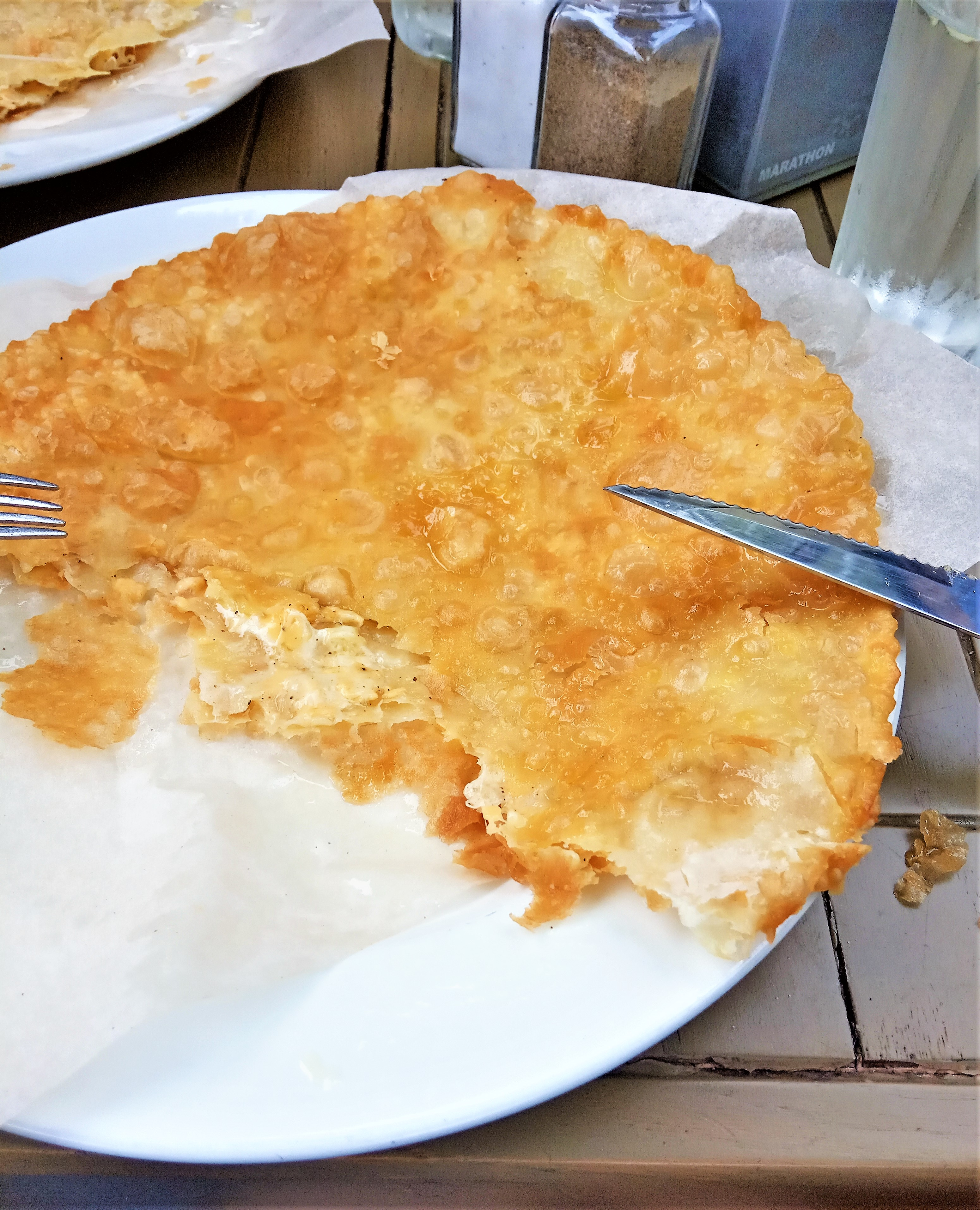 Генерала Пухова вулиця, кафе Біердекель, Чернігів, 10 серпня 2020.